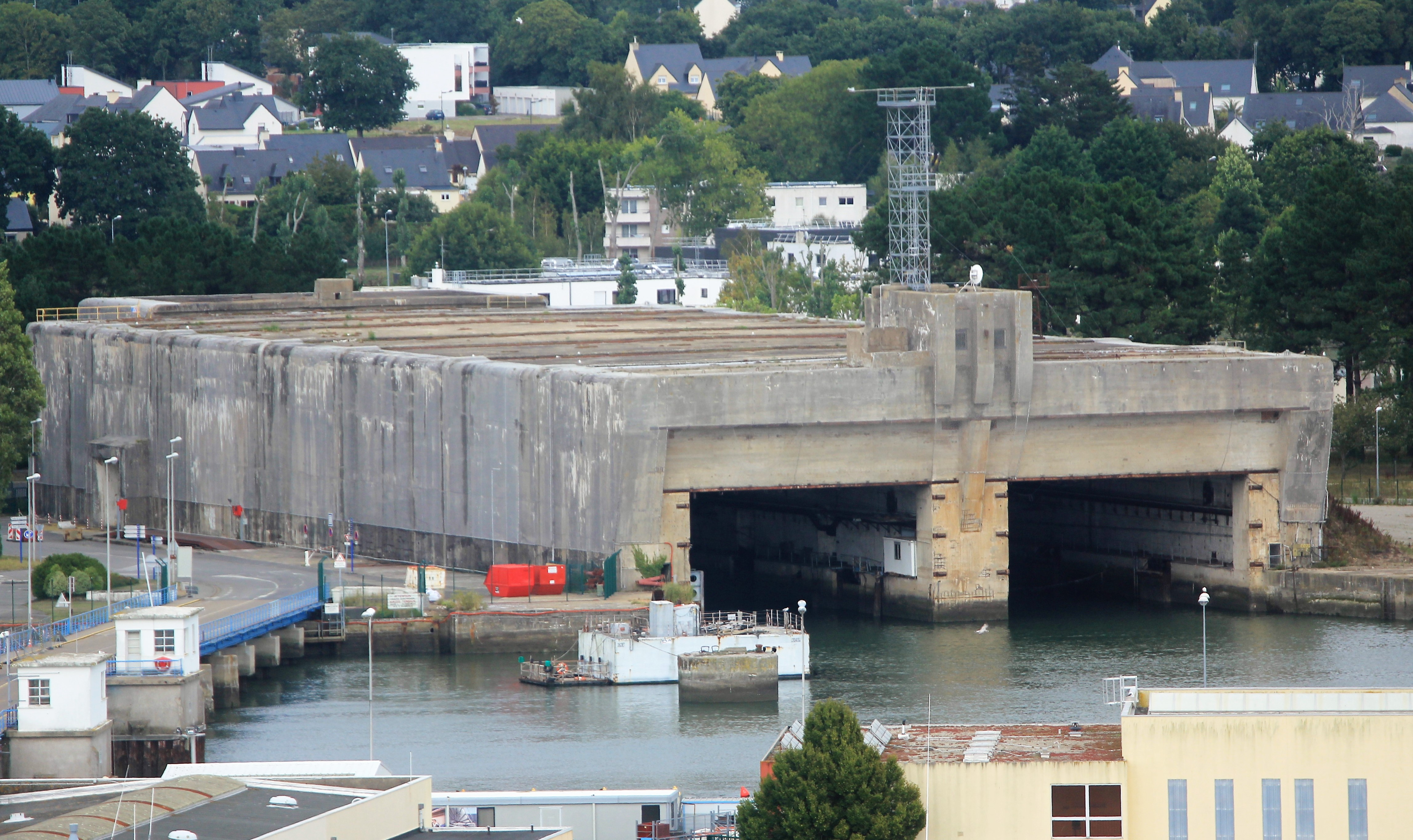 Vue de Lorient depuis le clocher de l'Église Notre-Dame-de-Victoire.